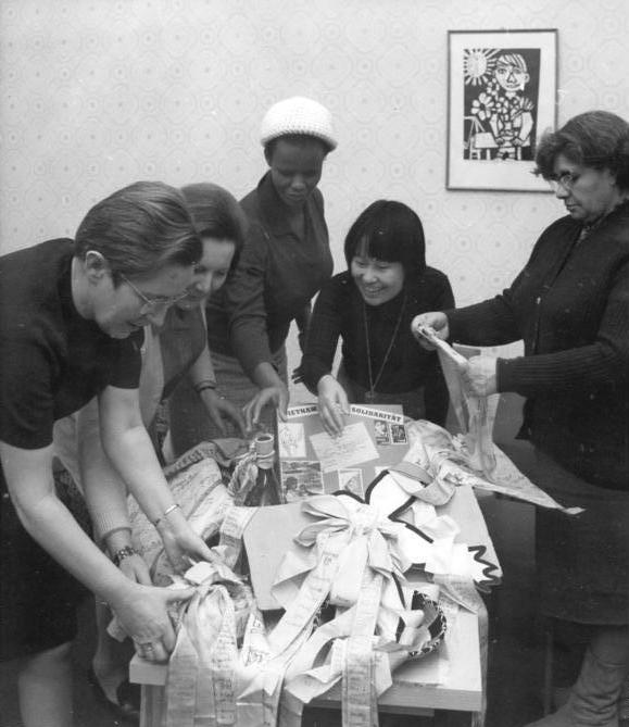 Zentralbild Mittelstädt 22.1.71 Berlin: Frauen des Oderbezirkes üben Solidarität mit Vietnam. Mit Geldbeträgen verbundene Unterschriften auf Schleifenbändern bekunden erneut die Solidarität der Frauen des Bezirkes Frankfurt-Oder mit dem kämpfenden vietnamesischen Volk. Aus Anlaß des 25. Jahrstages der IDFF rief der DFD-Bezirksvorstand die Frauen des Oderbezirkes zu dieser Solidaritätsaktion auf. I, Sekretariat der IDFF, in Berlin, nahmen die Generalsekretärin des IDFF, Cecilie Hugel - Frankreich -(2.v.l.), und die Mitglieder des Sekretariats der IDFF: Helga Dickel (links) - BRD, Kate Molale (3.v.l.) - Südafrika -, Takako Tatematsu (2.v.r) - Japan sowie Emperatin Villarros (rechts) aus Chile, die Solidaritätsspende entgegen.